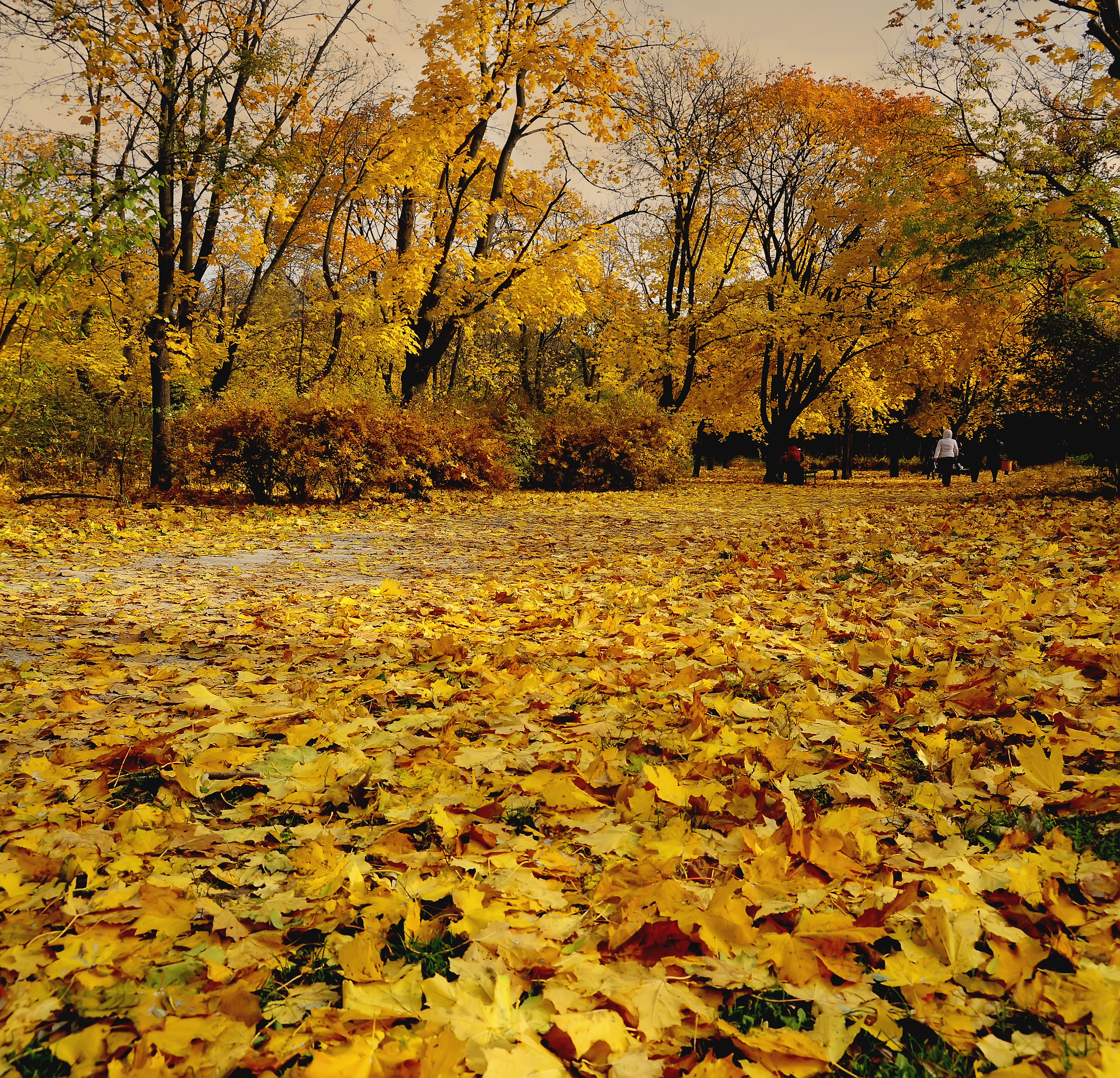 Дендропарк «Перемоги», м. Одеса, пр-т Шевченка, 14